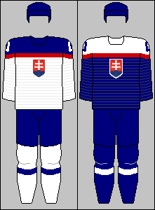 Slovak national team jerseys from Winter Olympic Games 2014 and World Championships 2014-2016